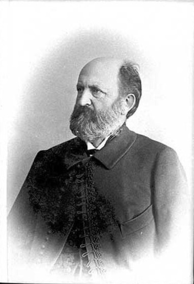 Houra, Jindřich Vladimír - rakouský a český politik